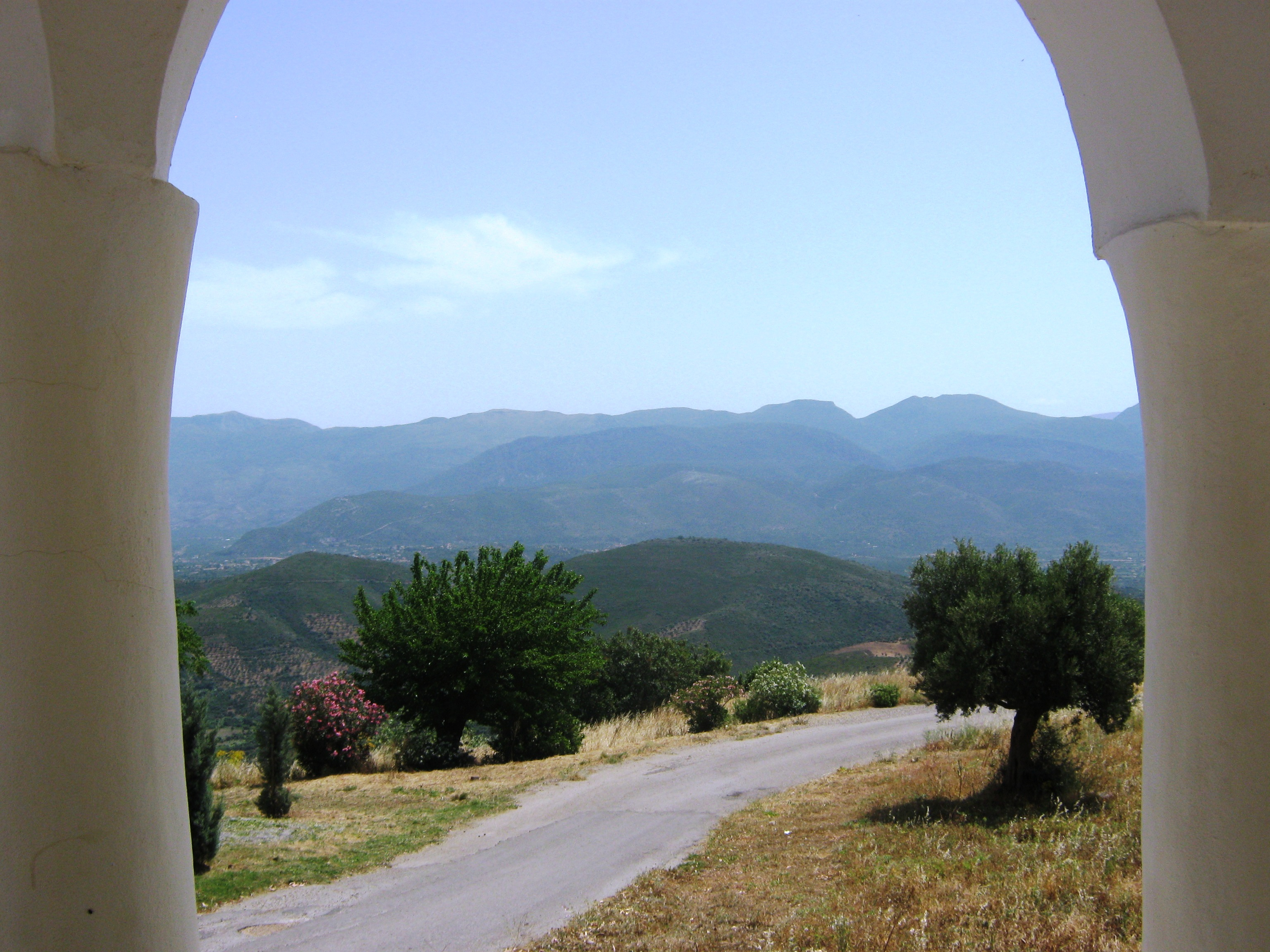 Ιερα μονη Βουλκανου Μεσσηνιας